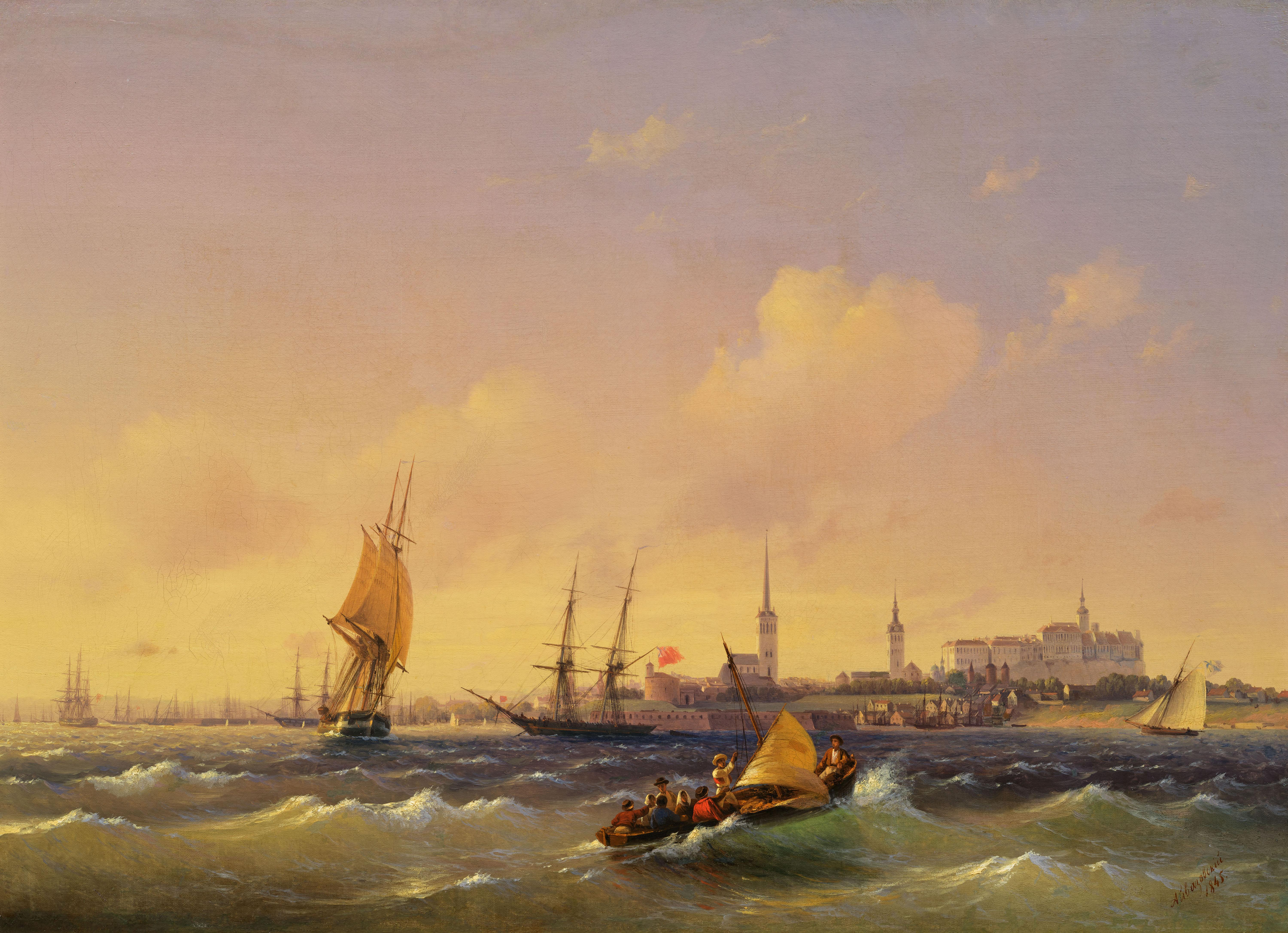 Reval (Tallinn)label QS:Len,"Reval (Tallinn)"label QS:Lde,"Reval (heute Tallinn) in Estland"label QS:Lru,"Ревель (Таллин)"